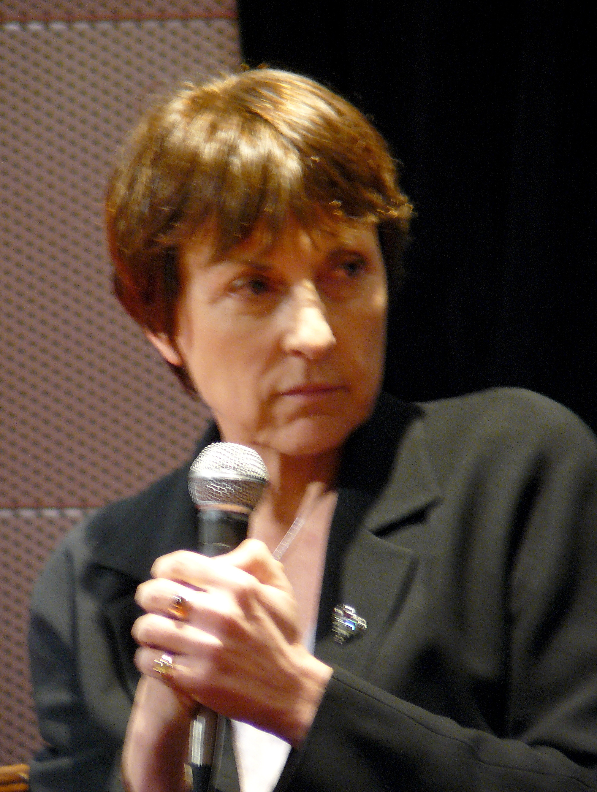 Josyane Savigneau, lors de la présentation de son livre "Benoîte Groult, une femme parmi les siennes" à la FNAC Ternes (Paris), le 11 mars 2010.